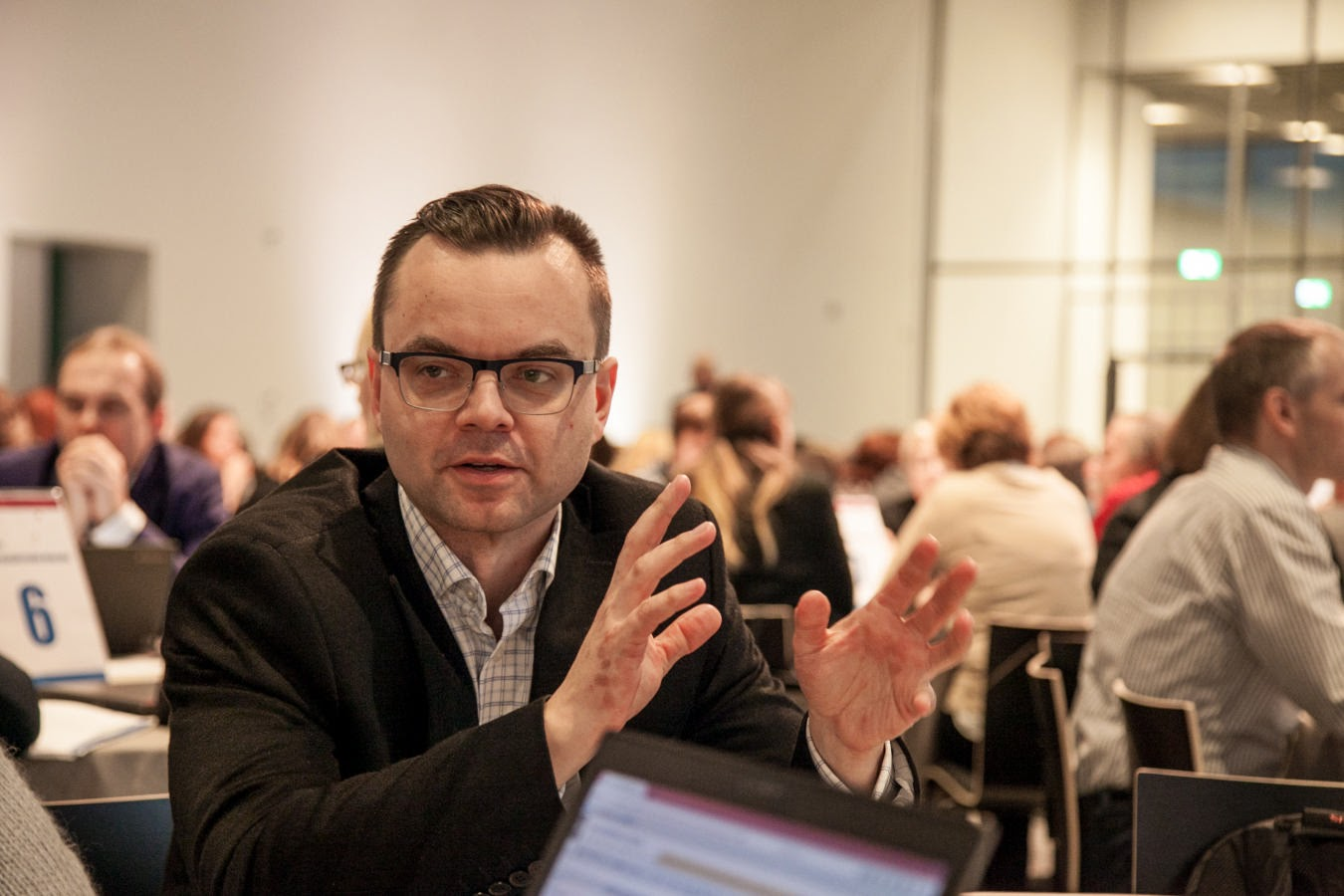 Martin Hallik 2016. aasta teaduskommunikatsiooni konverentsil.